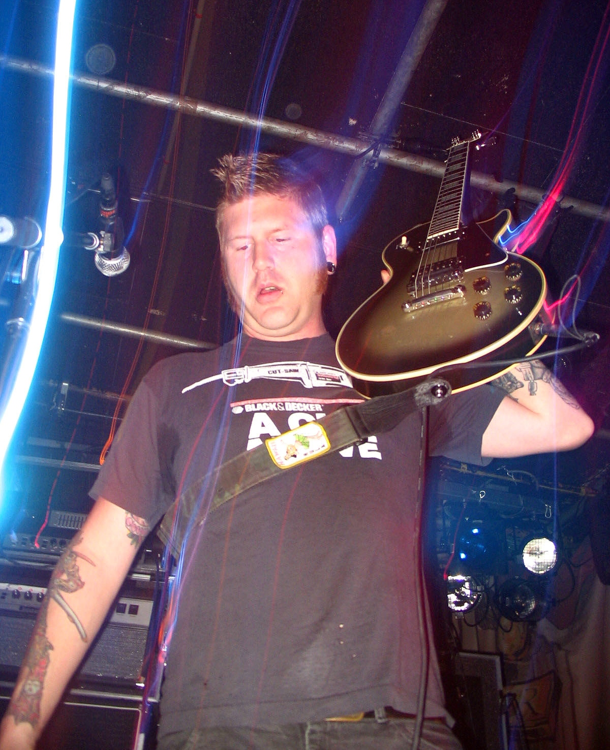 Bill Kelliher live in Burgerweeshuis (Niederlande)